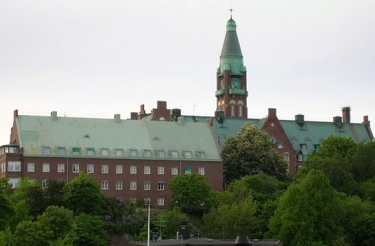 Danvikshem från söder.